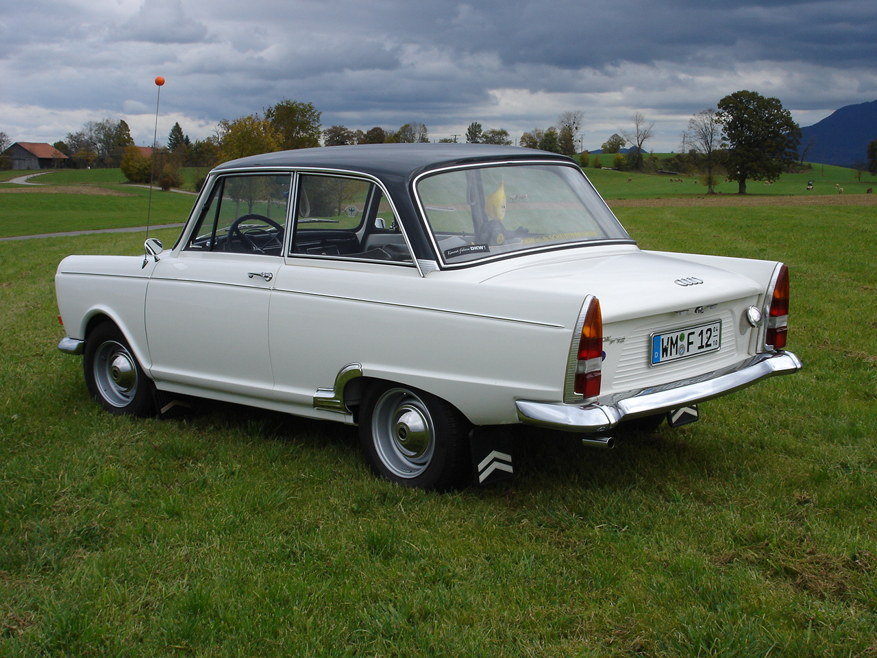 DKW F12